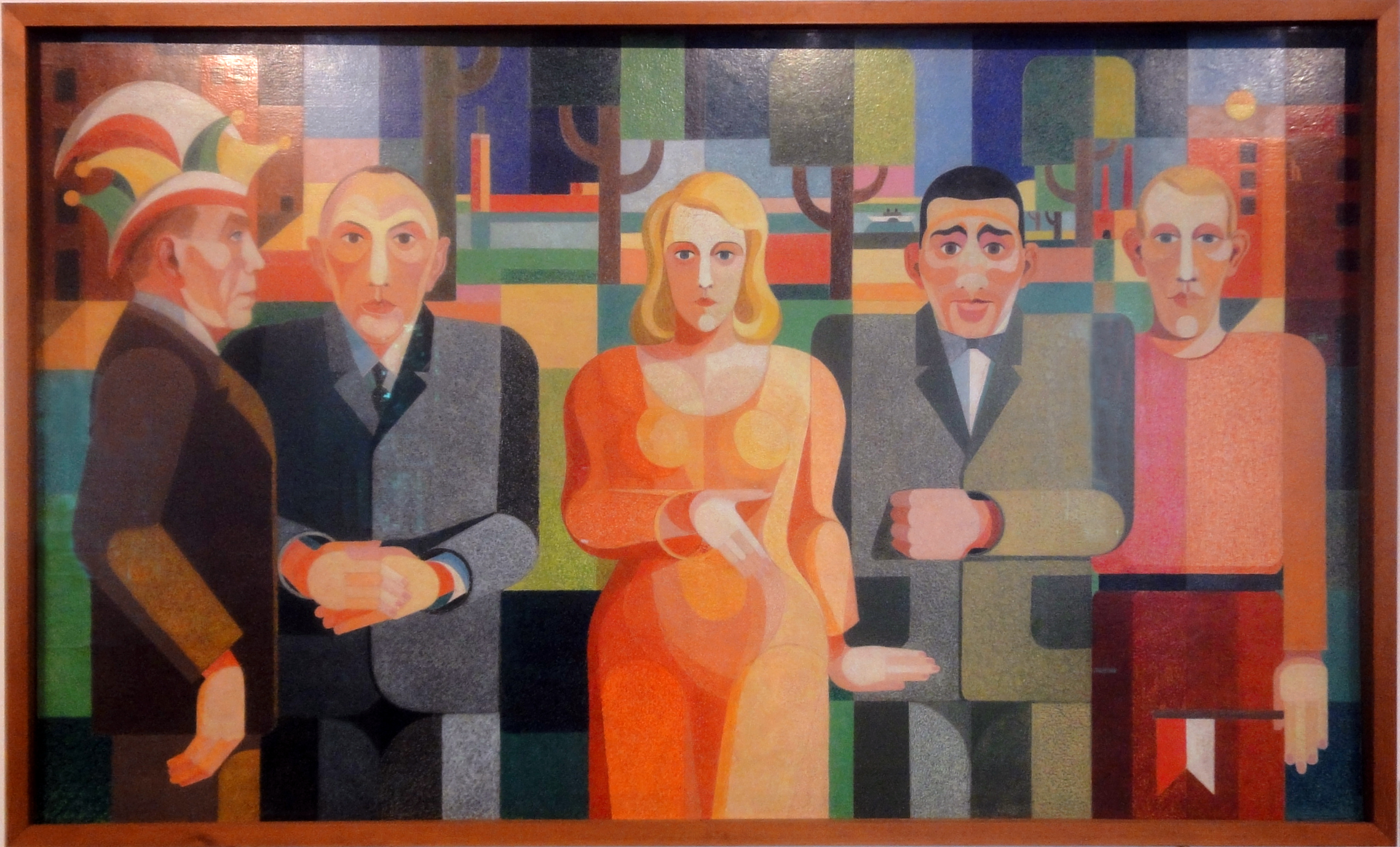 Auf dem Bild: Sänger Willi Ostermann, Oberbürgermeister Konrad Adenauer, Soubrette Trude Alex, Boxer Hein Domgörgen, der Künstler Heinrich Hoerle selbst